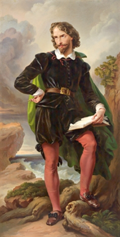 Ganzfiguriges Portrait eines Dichters